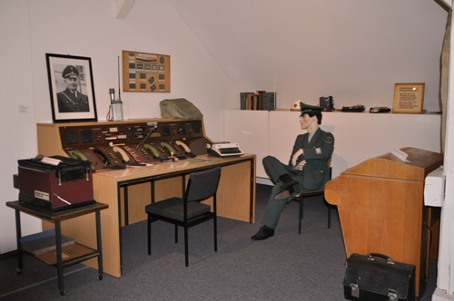 Alter Wachtisch im Museum des PP Westhessen